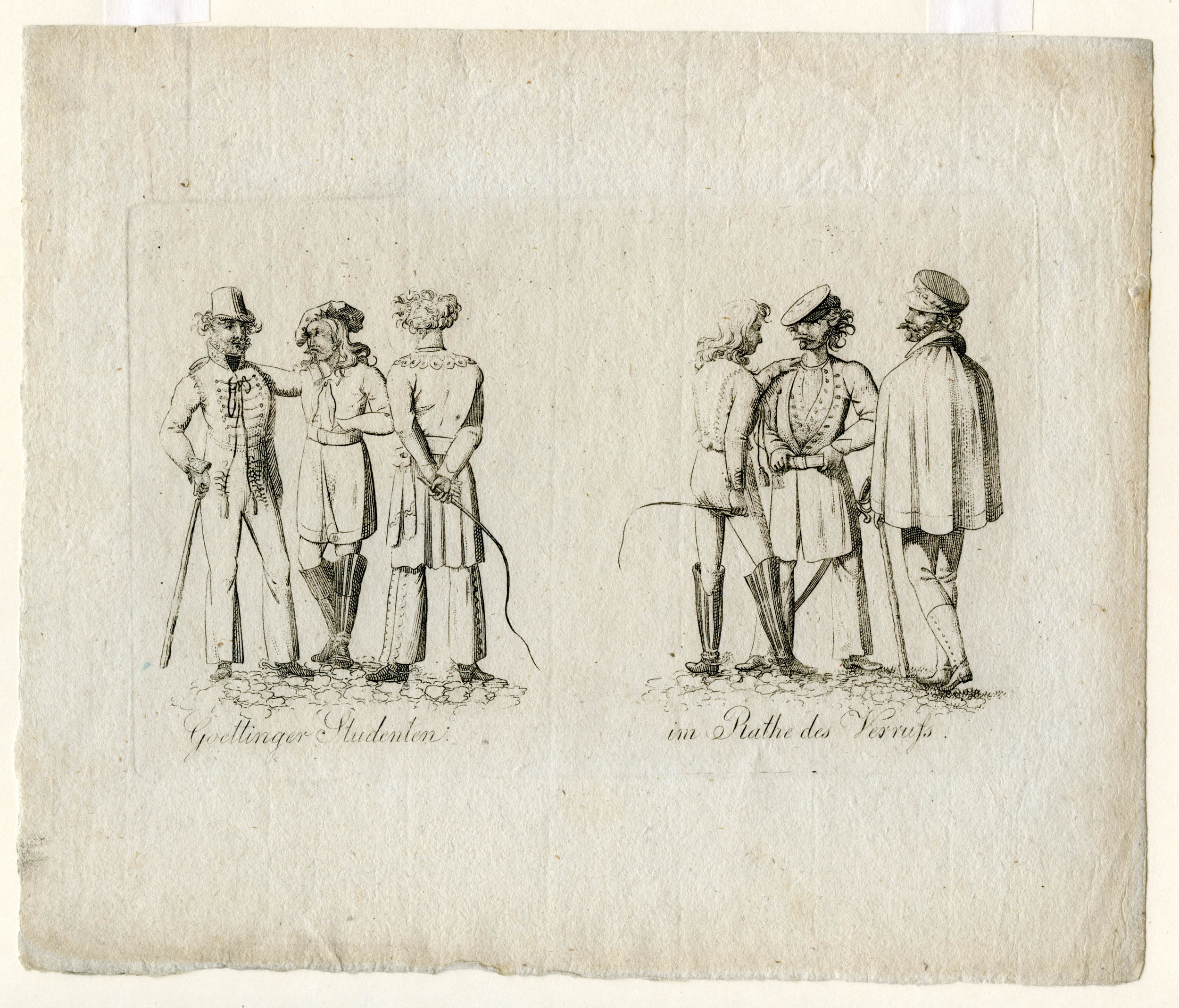 Göttinger Studenten 1818. Stich Göttinger Studenten - Im Rathe des Verrufs als Illustration in: Anonym: Der Studentenstreit oder die neuesten unruhigen Ereignisse auf der Universität zu Göttingen im July und August 1818, Witzenhausen 1818